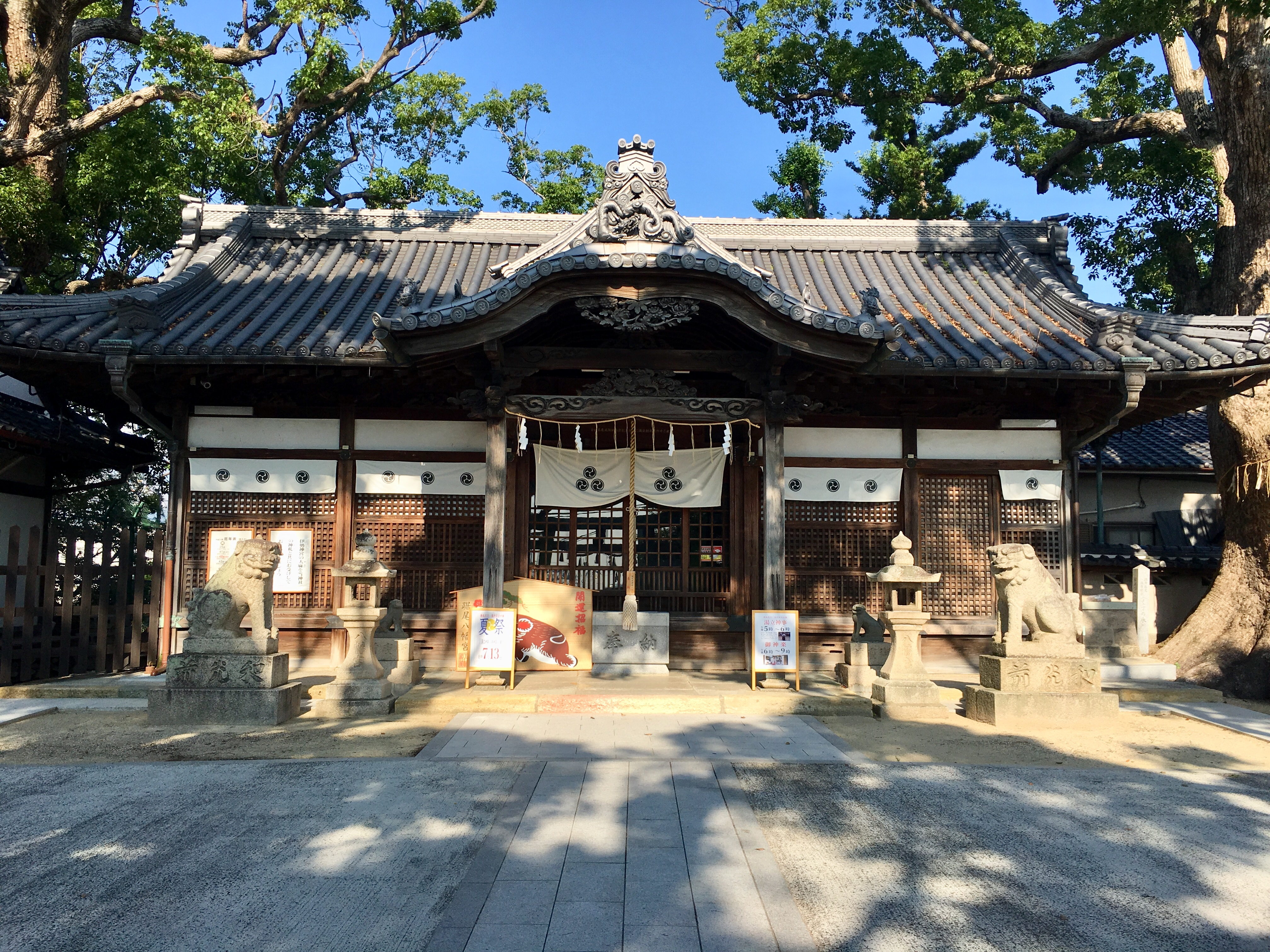 2019年7月、踞尾八幡神社で撮影。